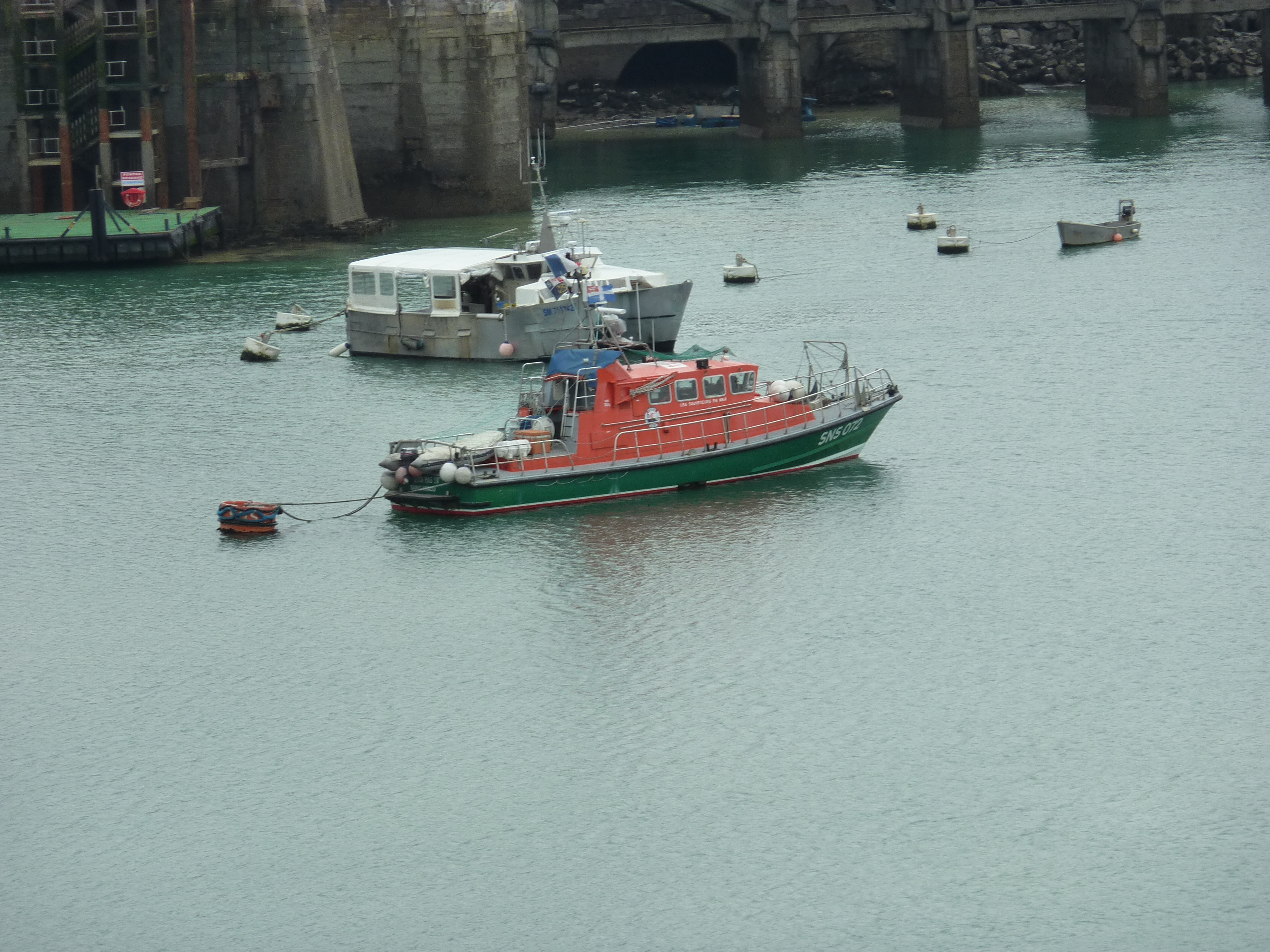 Le bâteau de sauvetage "Pourquoi pas? II" dans le port de Saint-Malo.